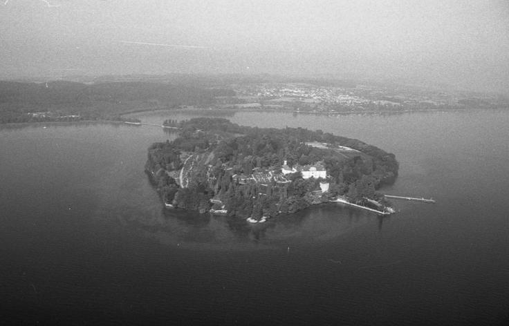 Rhein-Bodensee-Bereisung des Rates von Sachverständigen für Umweltfragen und des Bundesministerium I. Mainau (Bodensee)